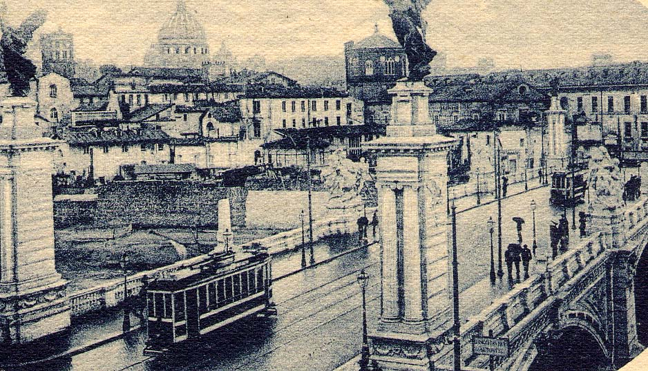 Ponte vittorio